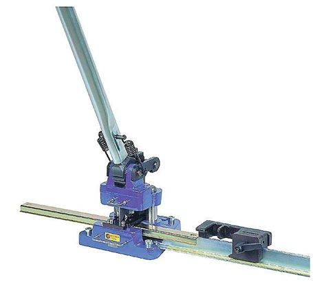 Eskuzko puntzonagailua